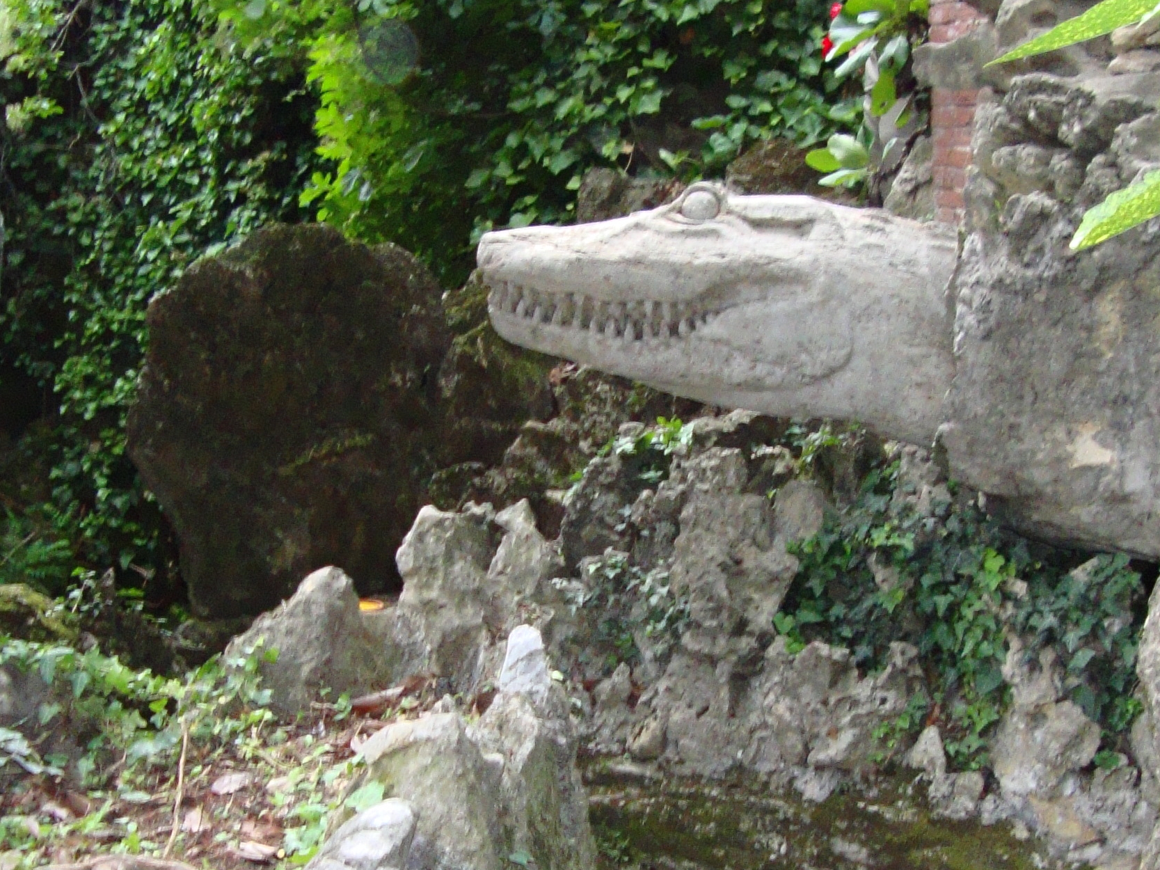 Schio, Giardino Jacquard This is a photo of a monument which is part of cultural heritage of Italy.